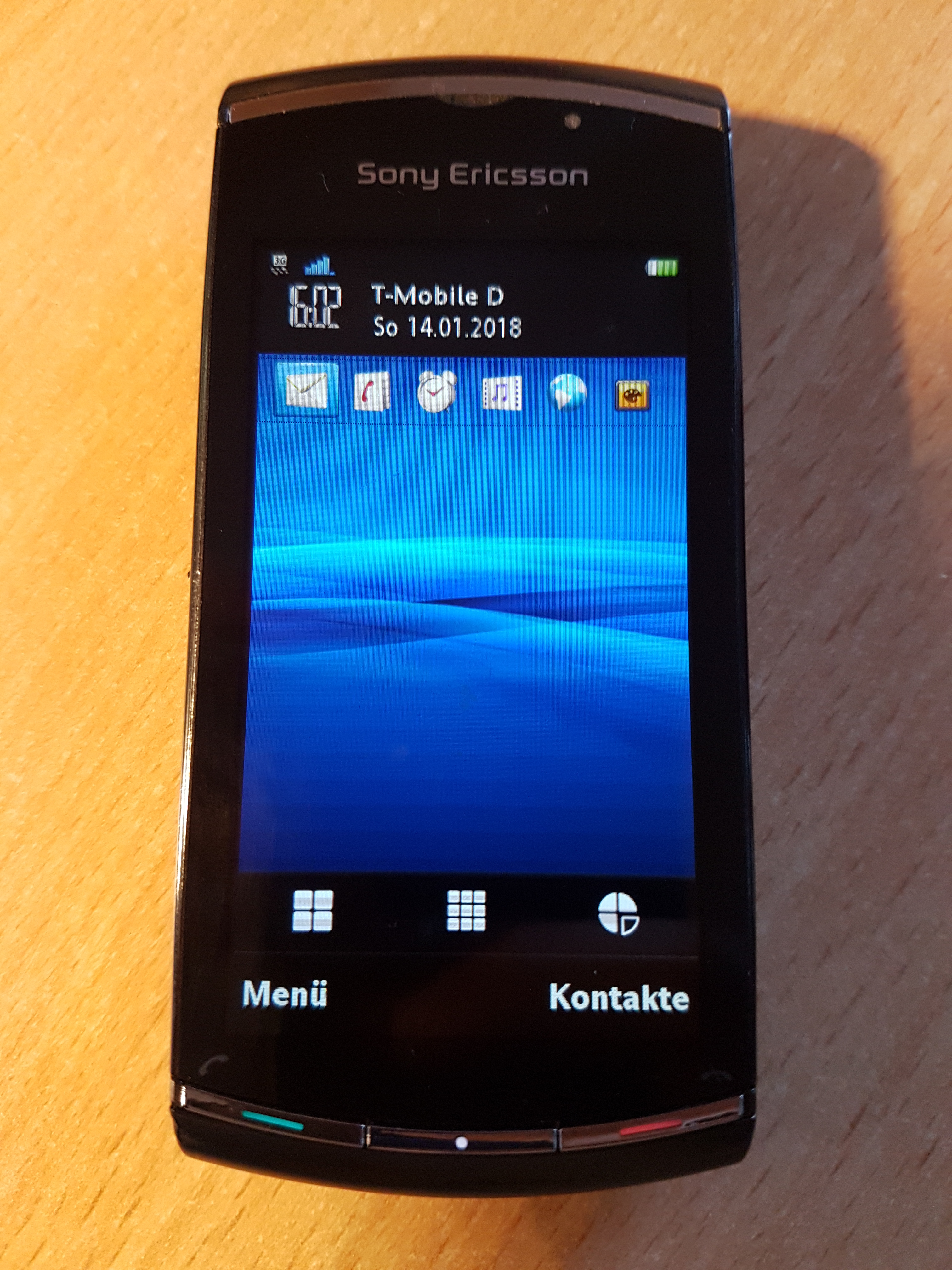 Sony Ericsson Vivaz Smartphone